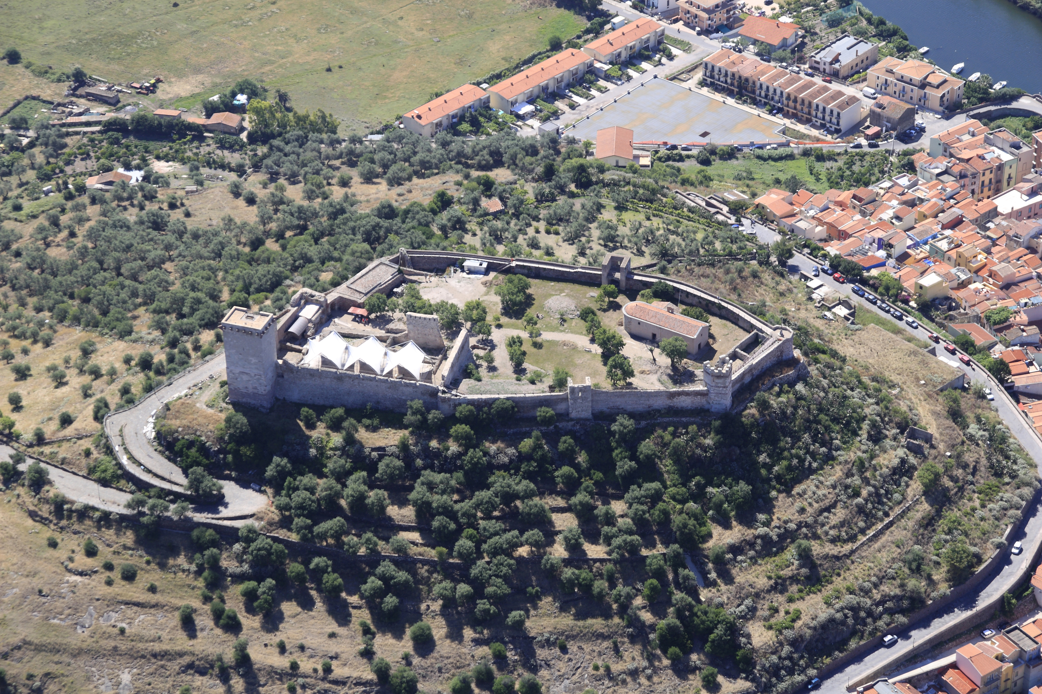 Castello Malaspina a Bosa This is a photo of a monument which is part of cultural heritage of Italy.